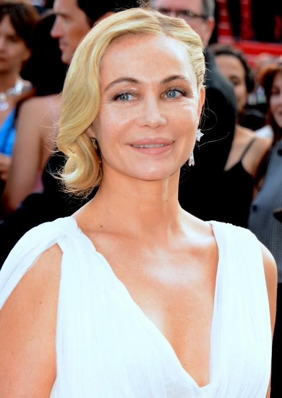 Emmanuelle Béart au festival de Cannes